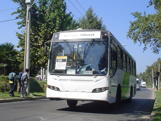 Microbus reacondicionado